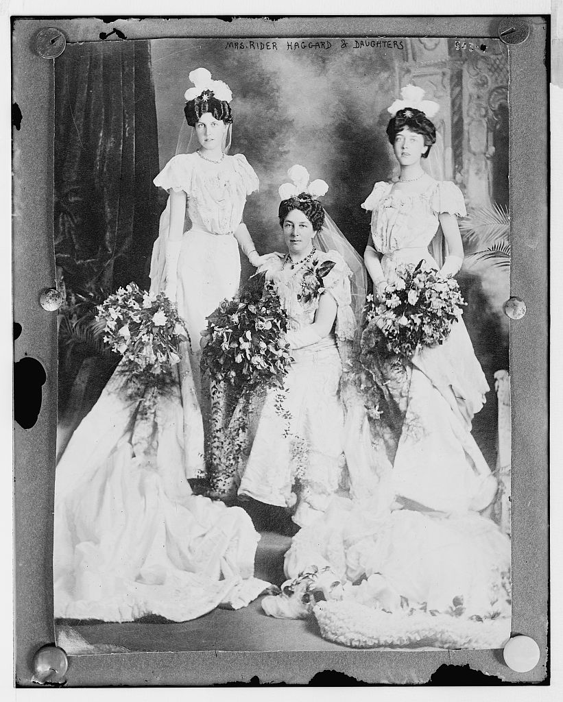 Mrs. Rider Haggard & daus.